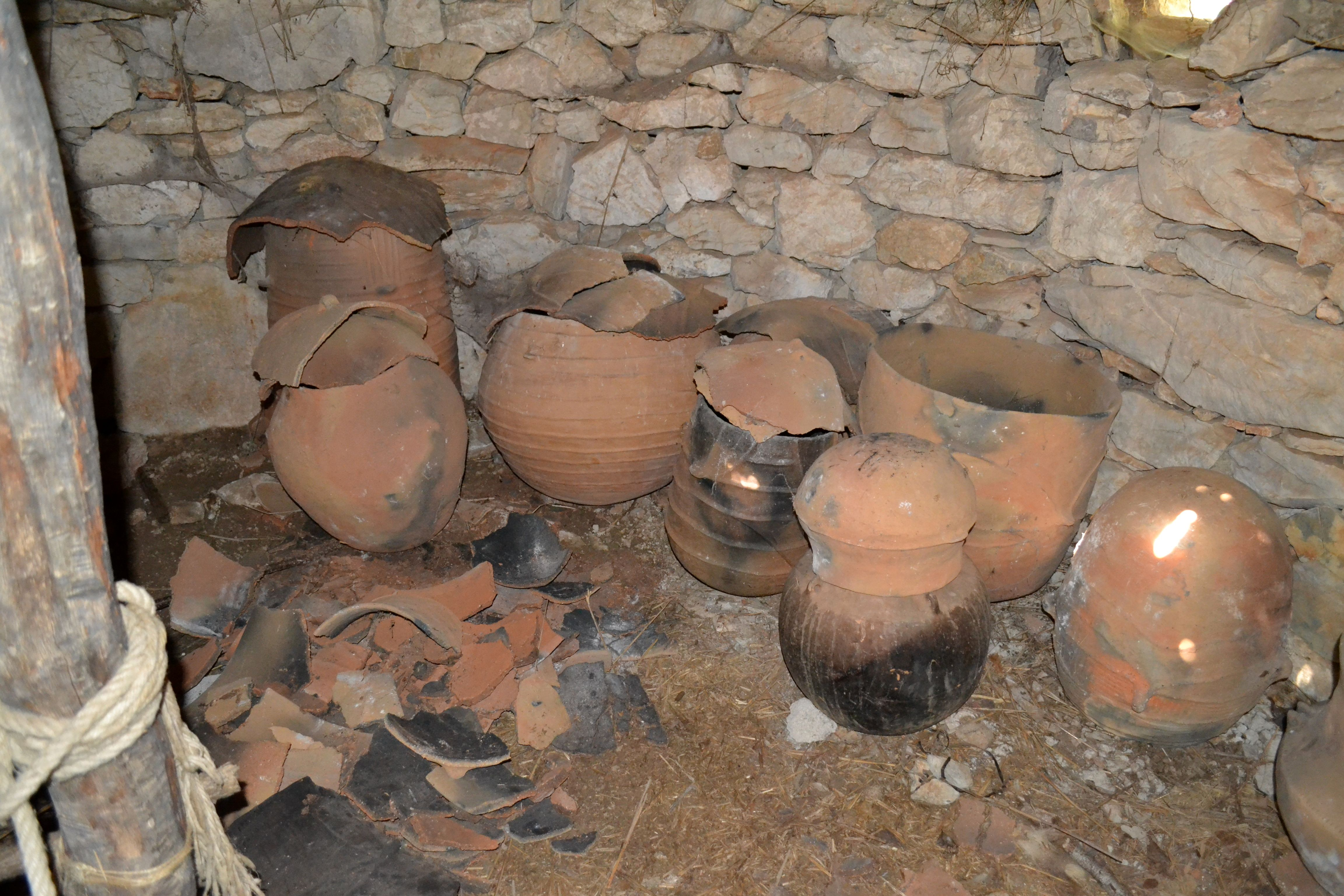 Village préhistorique de Cambous à Viols-en-Laval (34). Poteries (copies) dans la maison reconstituée.